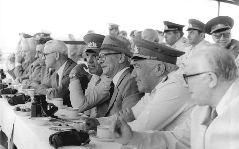 DDR, NVA-Truppenbesuch, Honecker ADN-ZB Mittelstädt 21.6.84 DDR: Truppenbesuch- Von der Tribüne beobachten der Generalsekretär des ZK der SED und Vorsitzender des Staatsrates der DDR, Erich Honecker, Vorsitzender des Nationalen Verteidigungsrates der DDR, und weitere Mitglieder der Partei-und Staatsführung wie Fallschirmjäger aus dem Truppenteil "Willi Sänger" Elemente ihrer Gefechtsausbildung im Gelände demonstrieren. [v.r.: Sindermann, Heinz Hoffmann, Honecker, Stechbarth, Stoph] Abgebildete Personen: Honecker, Erich: Staatsratsvorsitzender, Generalsekretär des ZK der SED, DDR (GND 118553399) Hoffmann, Heinz: Minister für Nationale Verteidigung, Mitglied des ZK der SED, DDR Stechbarth, Horst: Stellvertretender Minister für Nationale Verteidigung, Generaloberst, DDR